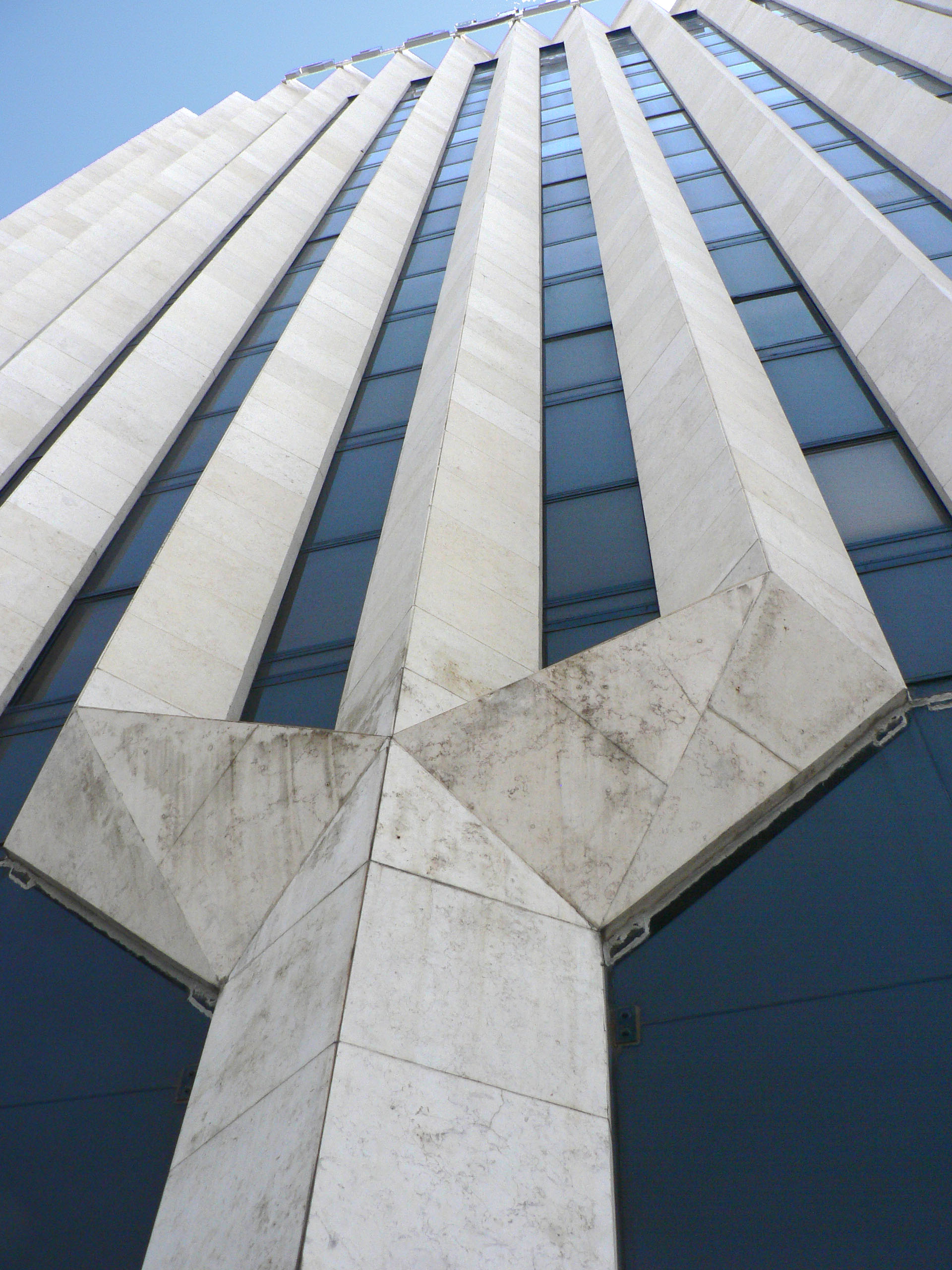 TriFork Tower - U-Bank Tower, Rotschild Boulevard, Tel Aviv, Israel מגדל הקילשון, שדרות רוטשילד, תל אביב, ישראל